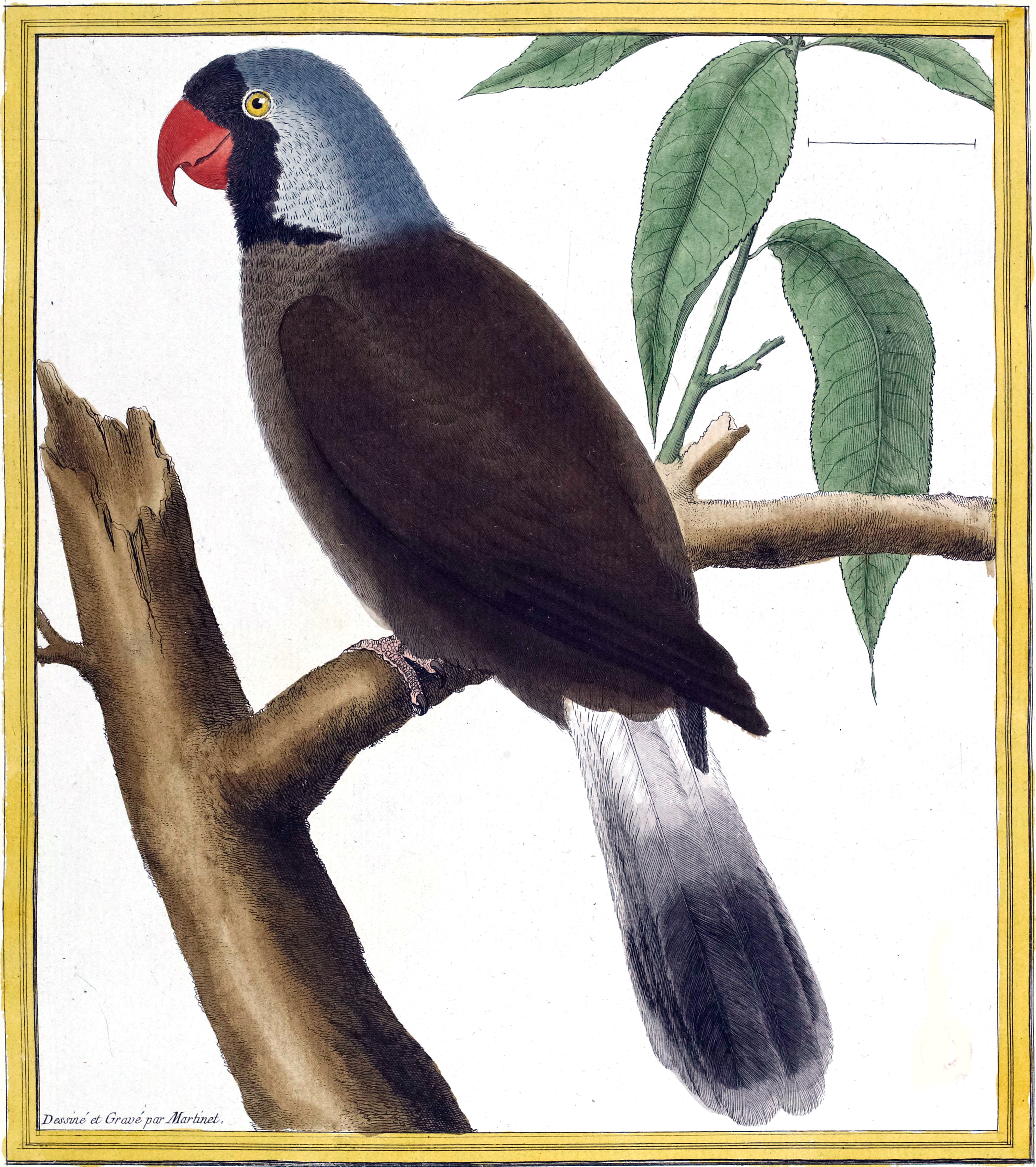 Mascarene Parrot (Mascarinus mascarinus) from Buffon's Histoire Naturelle Des Oiseaux. By François-Nicolas Martinet (c. 1725-c. 1804) (artist and engraver) & Comte de Buffon (Georges Louis Leclerc) (1707-1788) (editor).